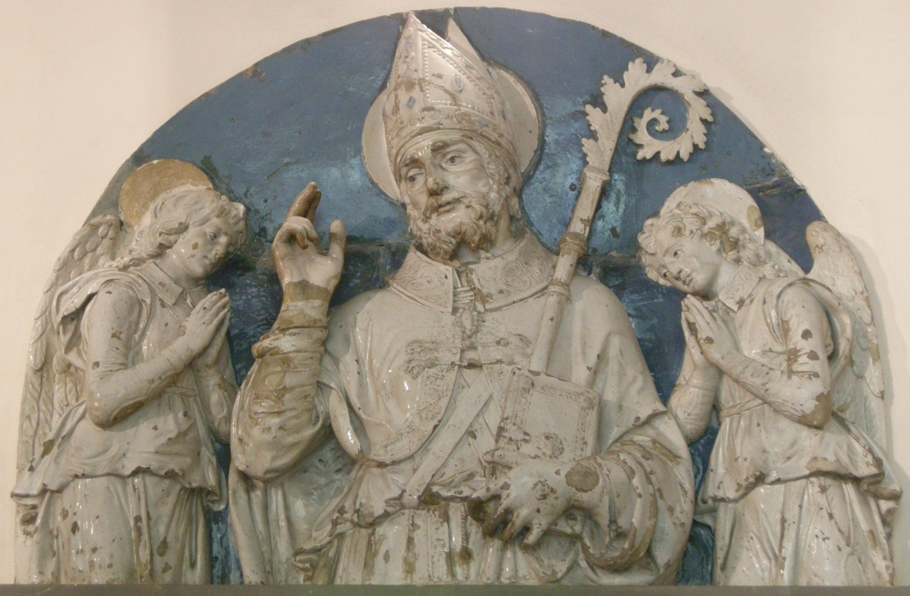 Andrea della robbia, san zanobi tra due angeli, 1496